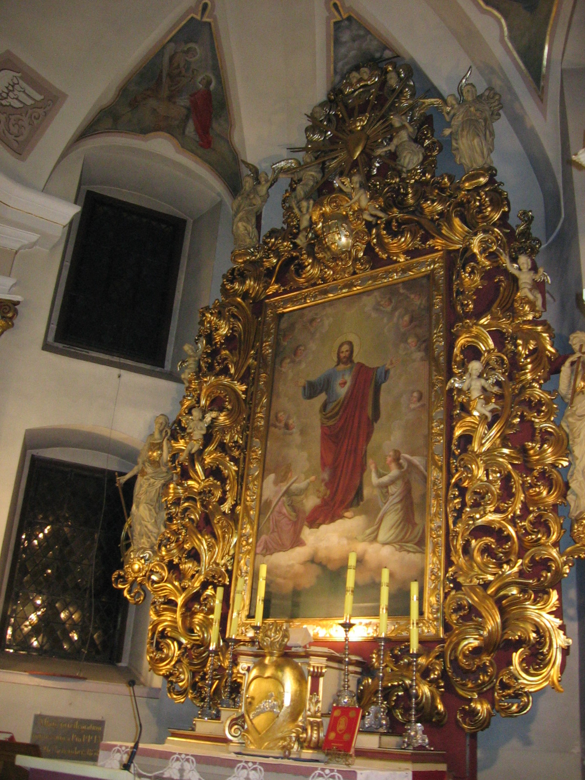 Ołtarz główny Kościoła pw. Św. Katarzyny Aleksandryjskiej w Toszku